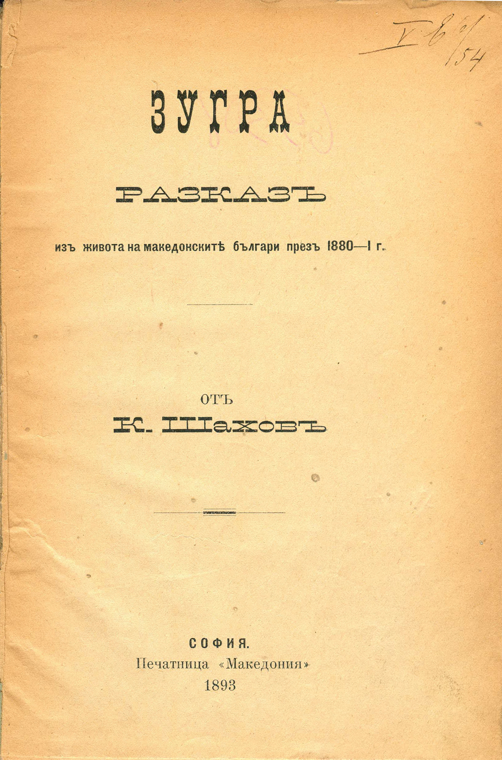 Титулна страница на разказа „Зугра“ от Коста Шахов